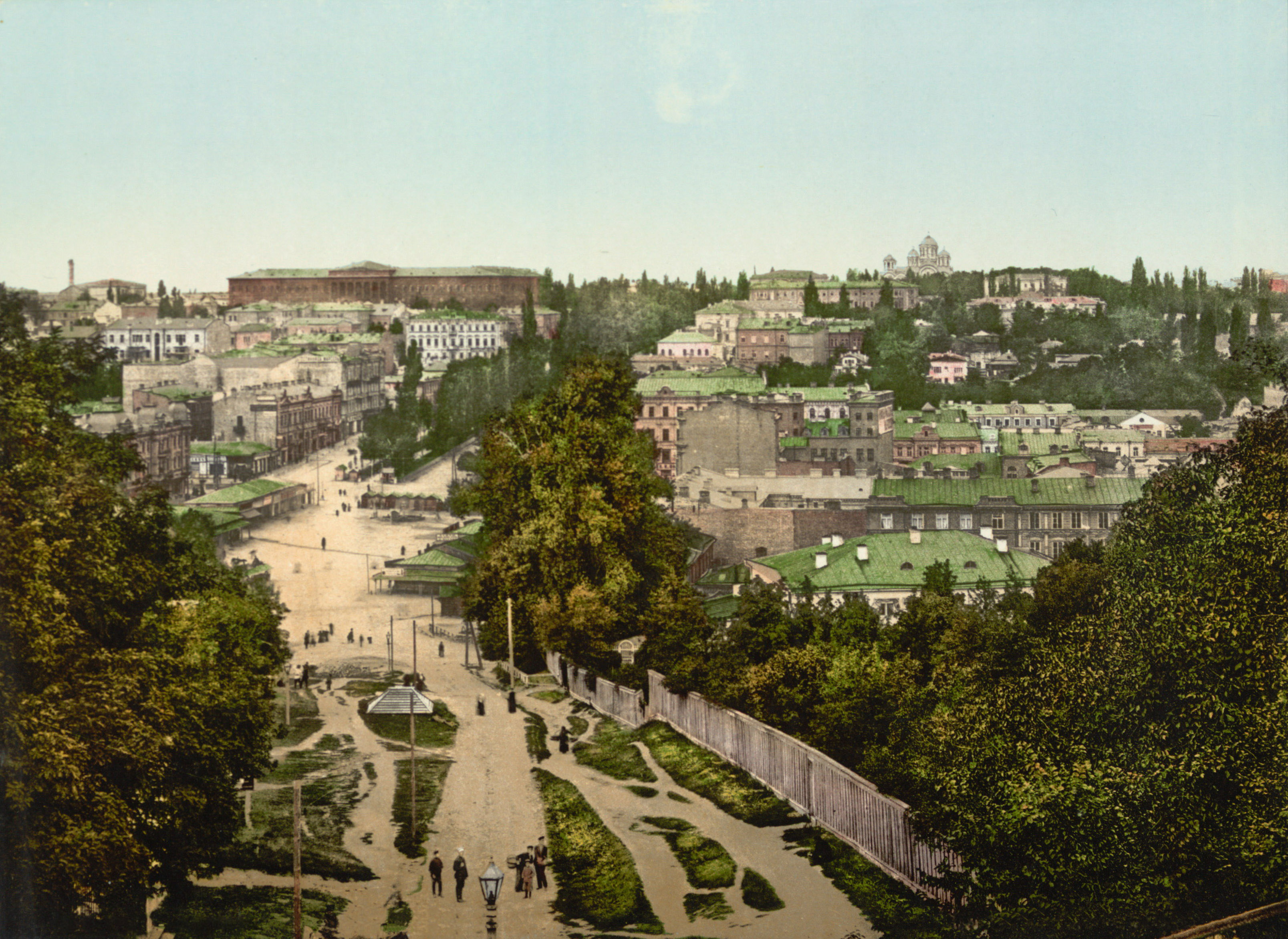 Бессарабська площа, сучасний бульвар Шевченка і Круглоуніверситетська вулиця